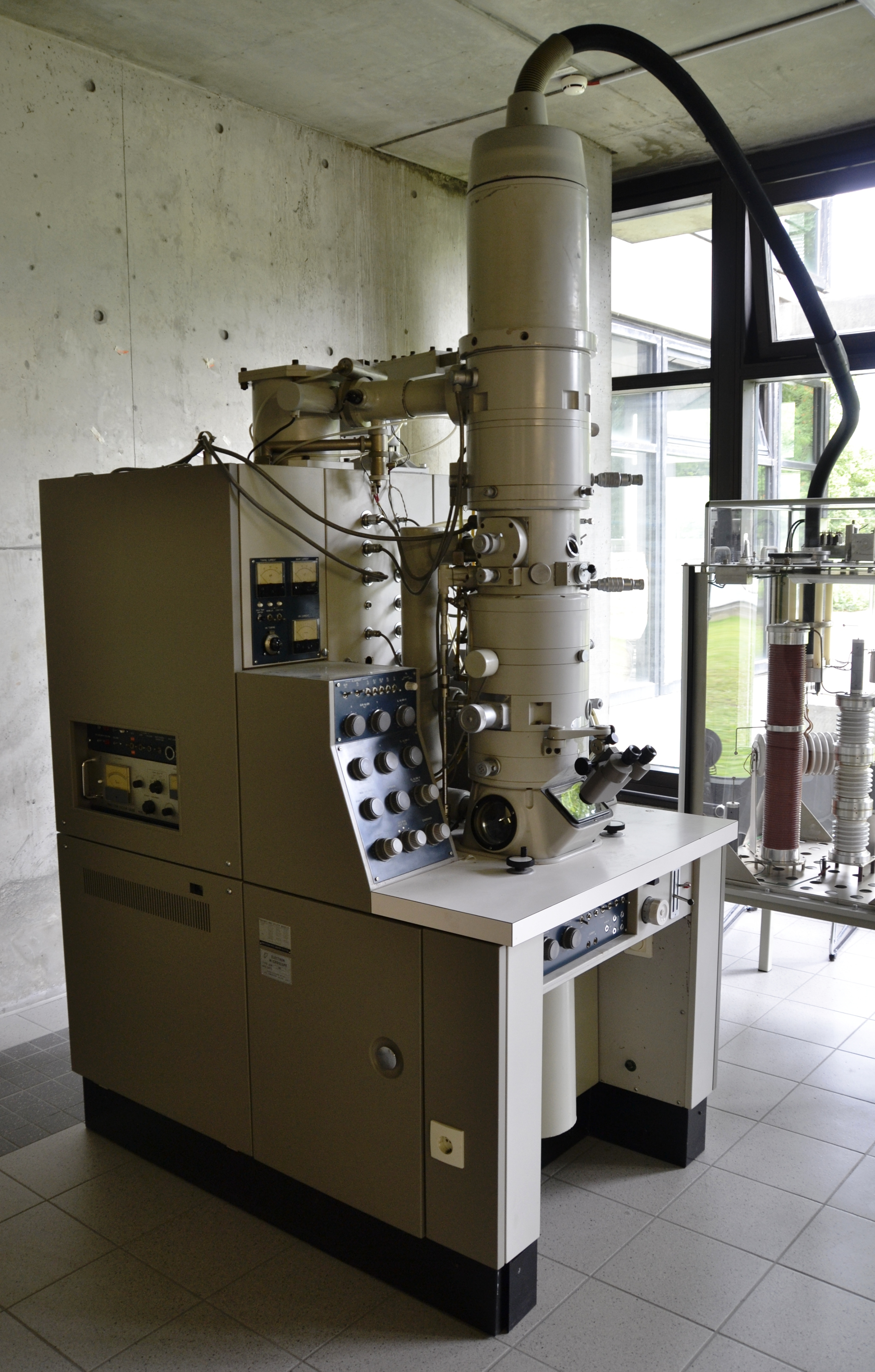 Das Transmissionselektronenmikroskop JEM-200A (aus den 1970er-Jahren) des japanischen Herstellers JEOL. Dieses TEM ist in der physikalischen Fakultät der Universität Regensburg ausgestellt.